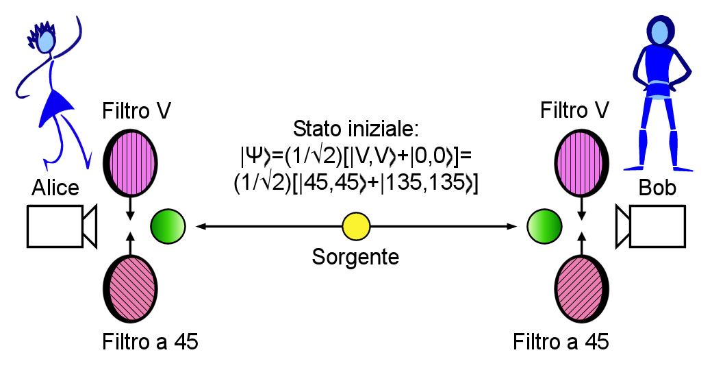 Schema della disposizione di Alice e Bob che si scambiano una chiave crittografica attraverso fotoni polarizzati. Autore: Ft1